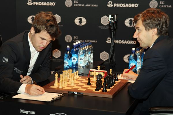 Карлсен - Карякин, 12 партия